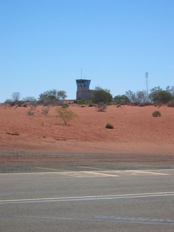 Yulara airport